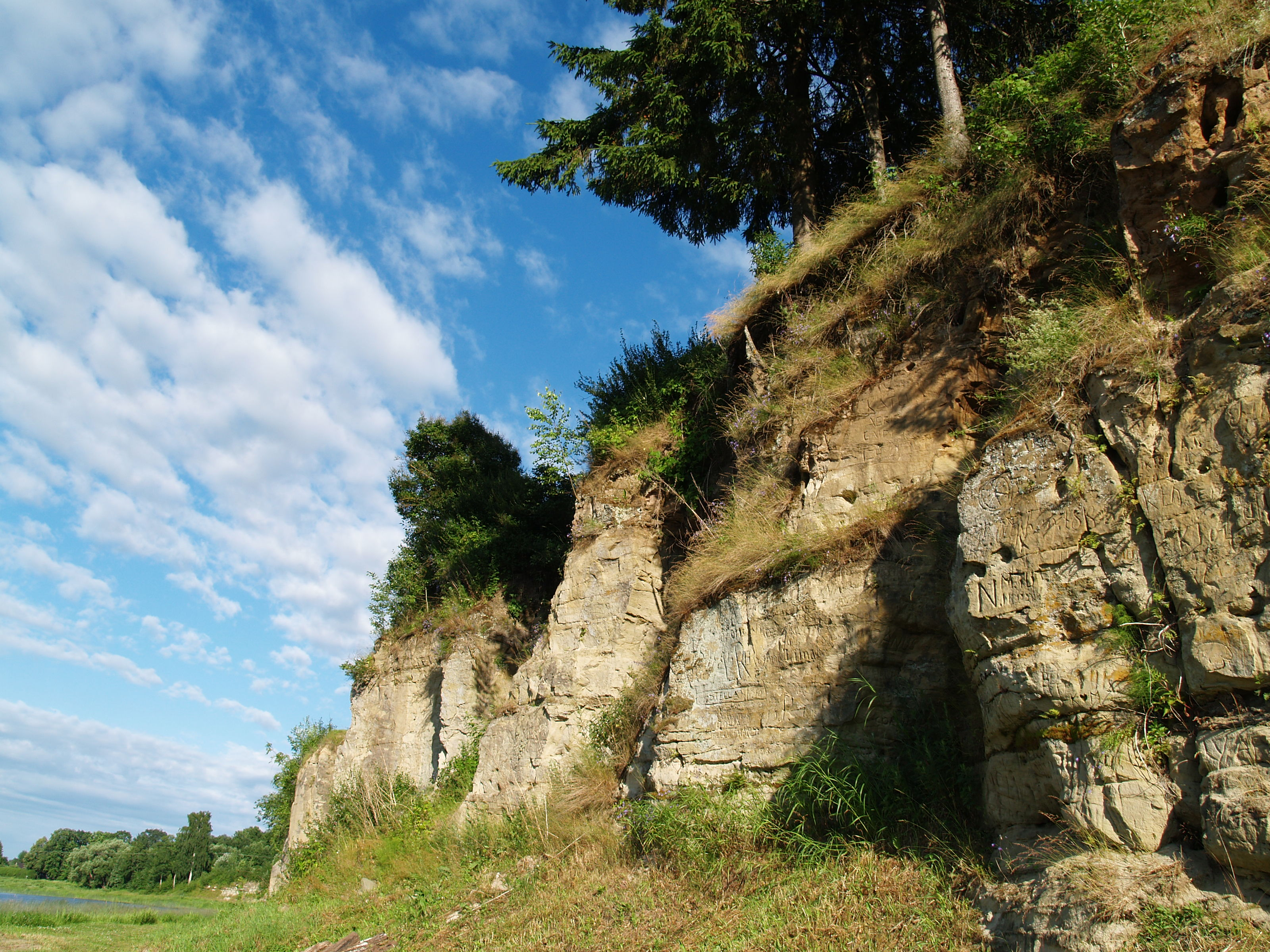 Kesk-Devoni liivakivipaljand Pärnu maakonnas Tori vallas.